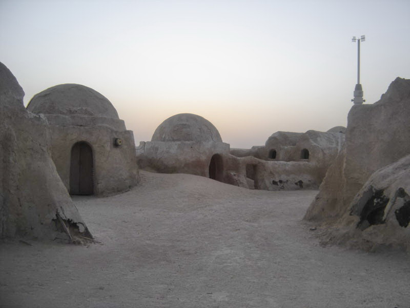 Photo prise lors d'un voyage organisé, dans le sud tunisien.Nous somme passer par Le Star Wars village, en tunisie.